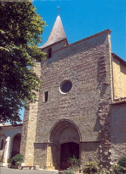 Date du cliché : septembre 2001.